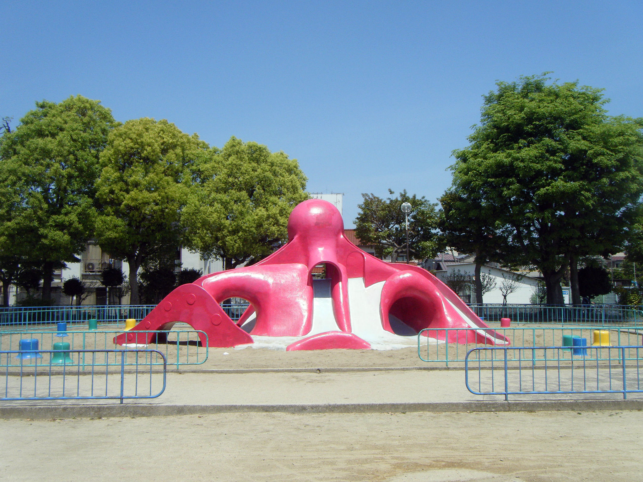 南の口公園 タコの滑り台